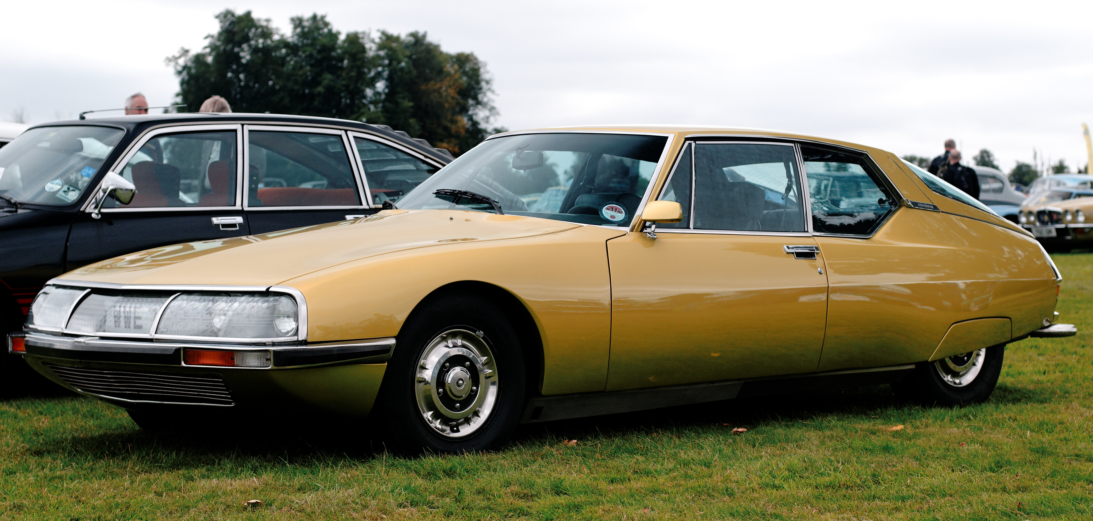 Citroen SM.